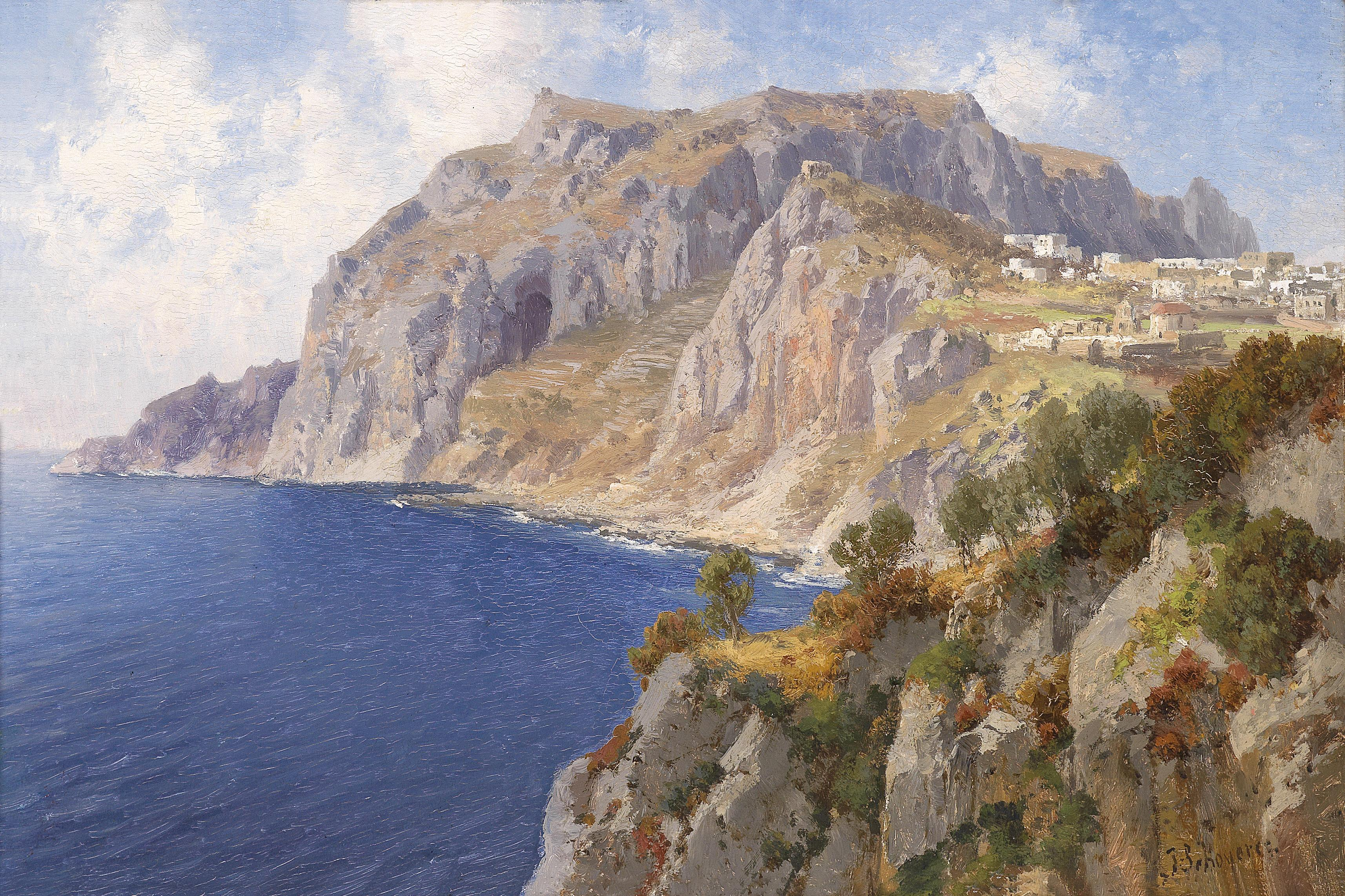 Blick auf Capri, signiert J. Schoyerer, Öl auf Holz,24 x 36 cm